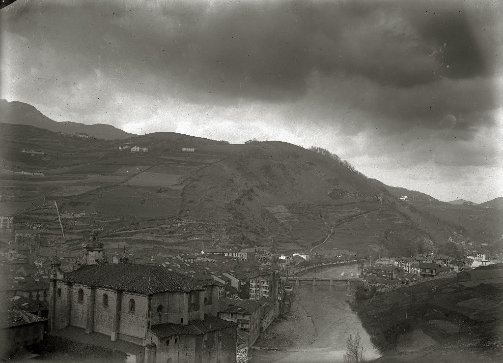 Título original: Vista general de la localidad de Tolosa desde la ermita de Izaskun (1/1) Localización: Tolosa (Guipúzcoa)